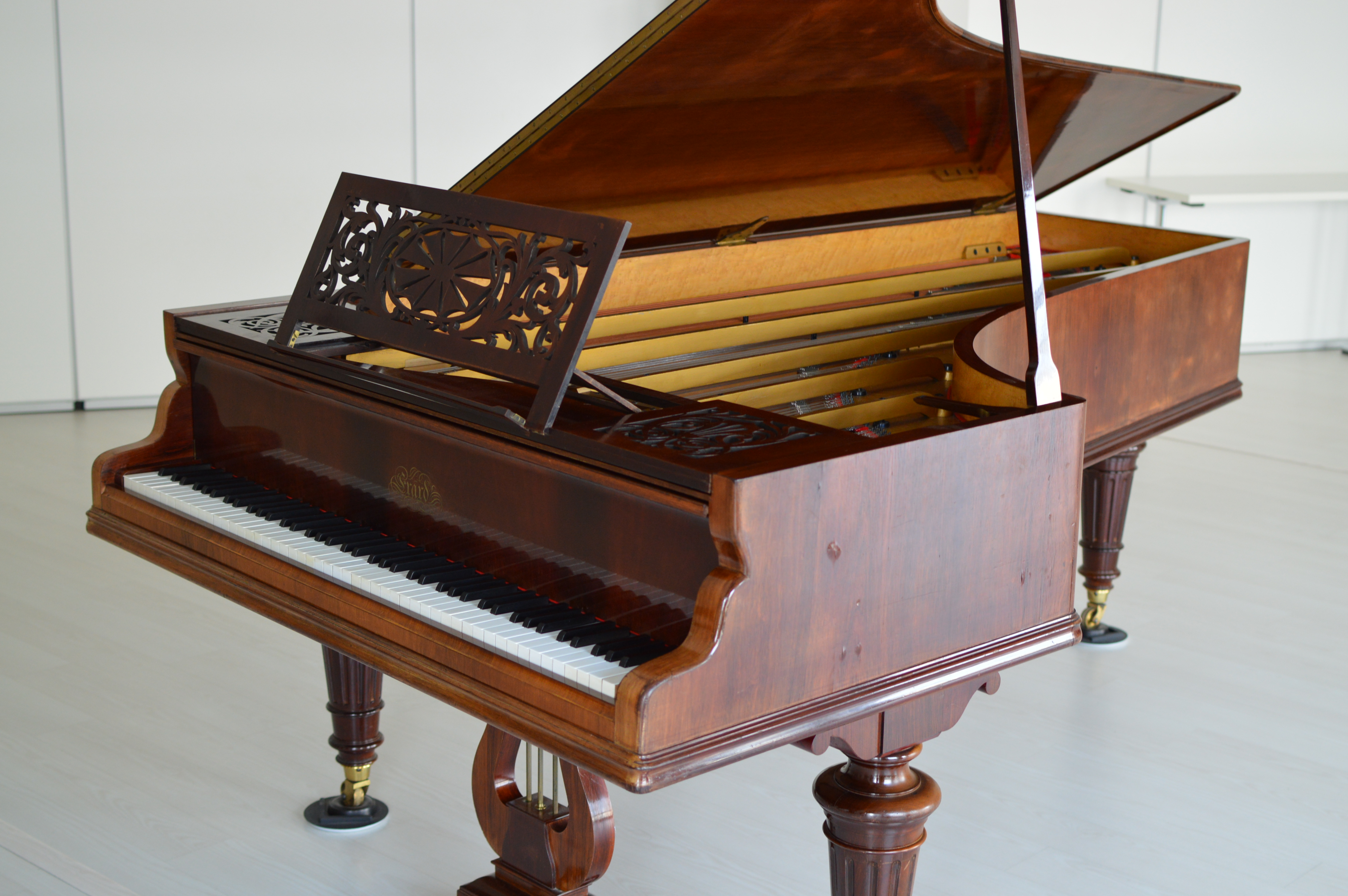 Vue du piano Erard 1907 ouvert.